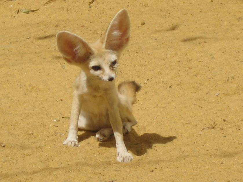 Fennec Fox